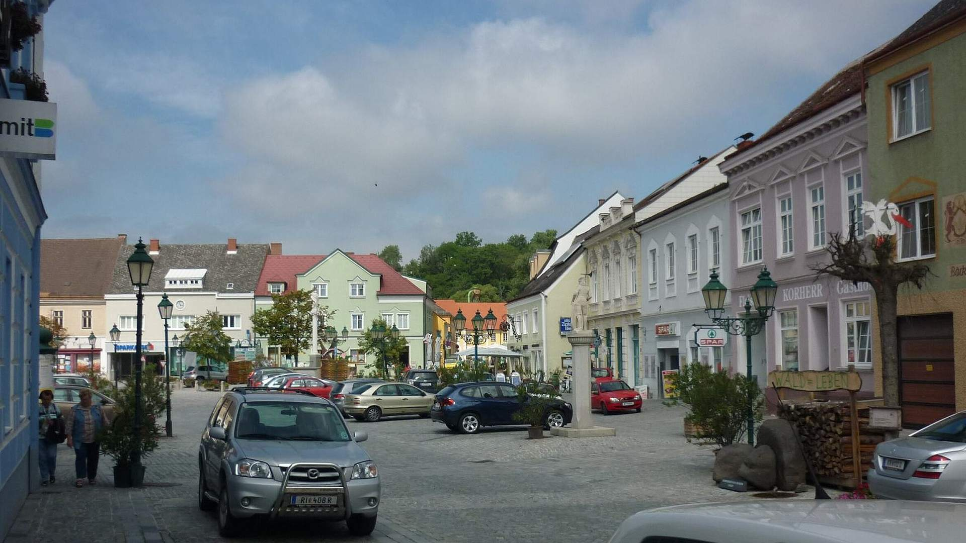 Náměstí v Raabs an der Thaya - obec na soutoku Moravské a Německé Dyje